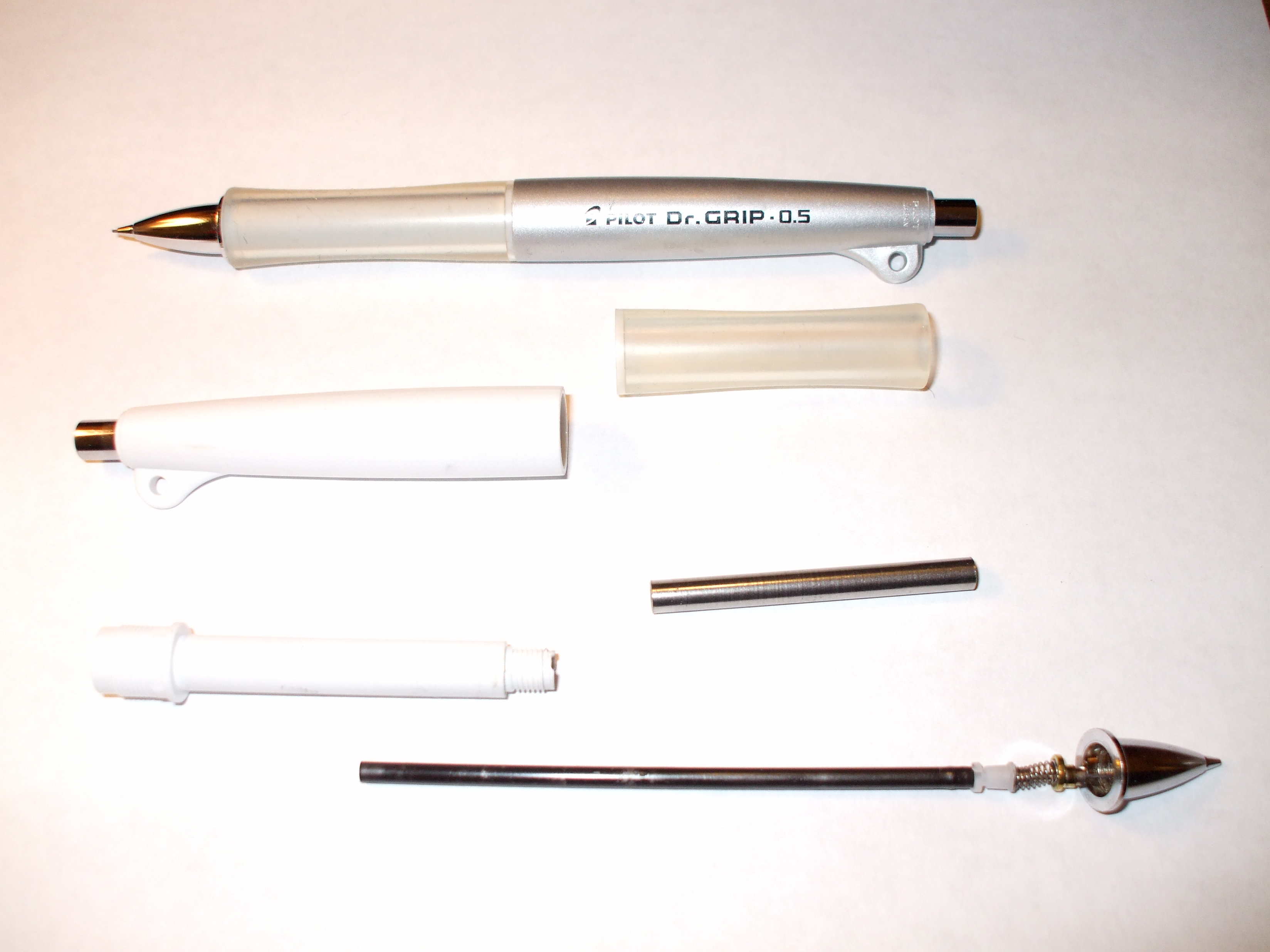 Dr.GRIP